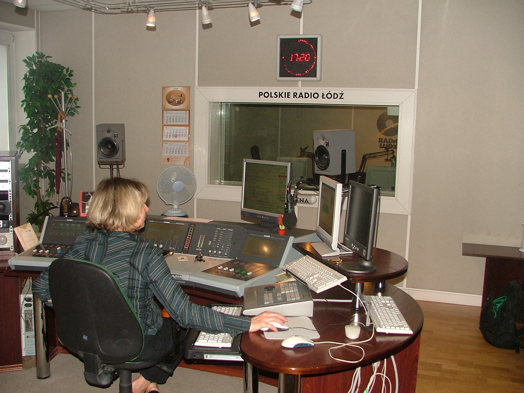 Polskie Radio Łódź, pomieszczenie reżyserki, prze szybę widoczne pomieszczenie studia